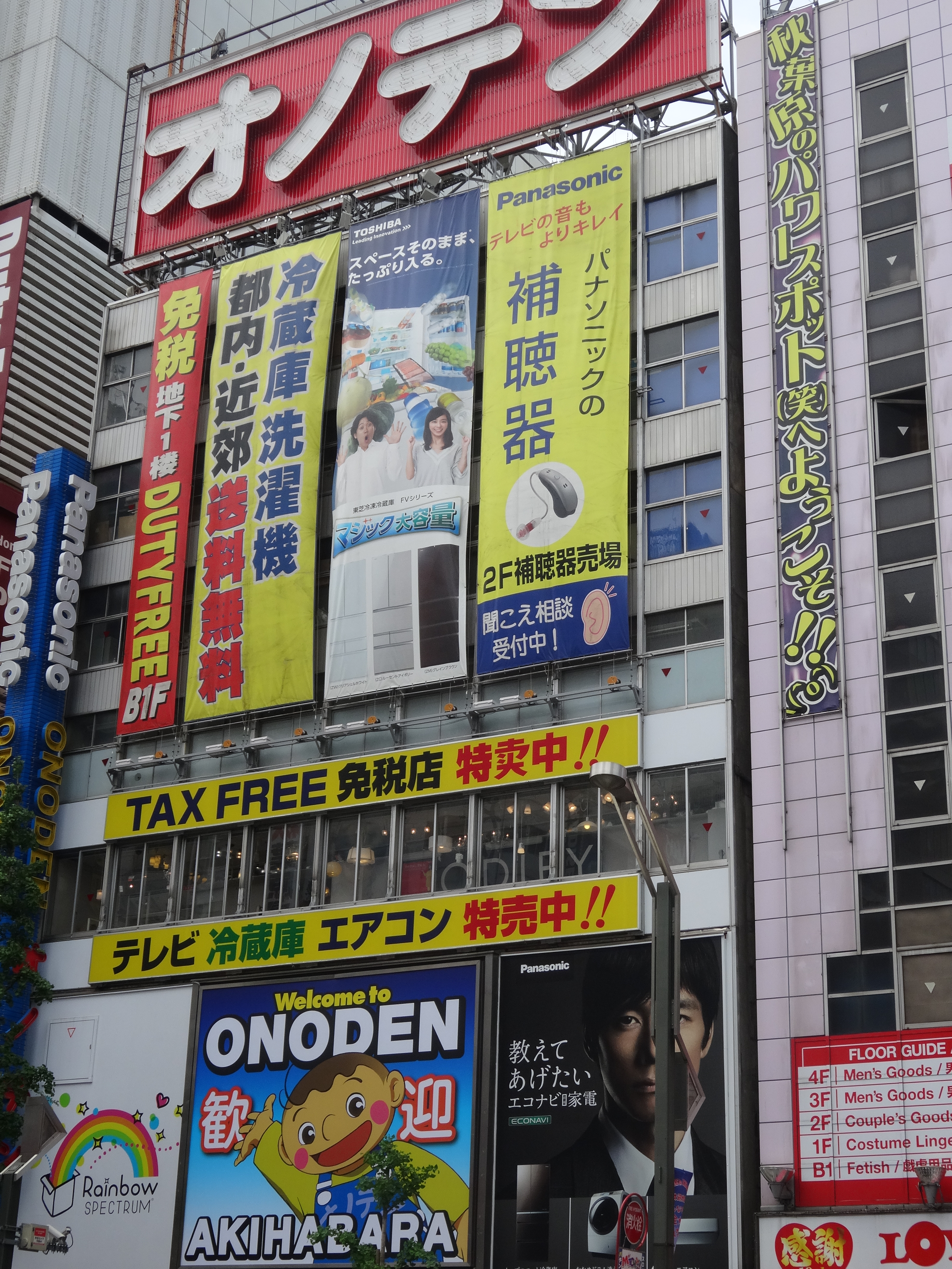 オノデン秋葉原本館。2015年5月撮影。